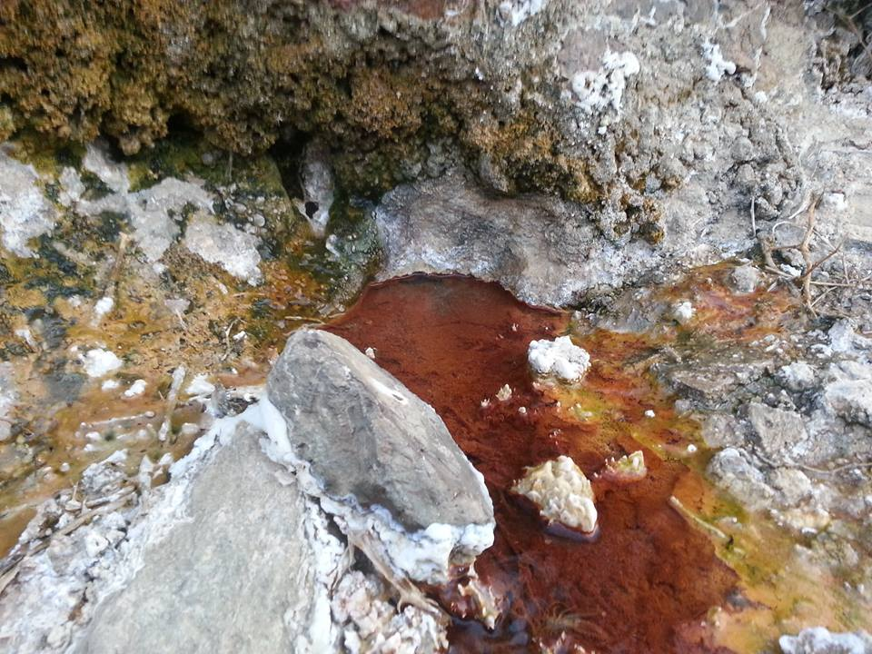 المياة الكبريتية عزلة الاسلوم بمديرية حزم العدين